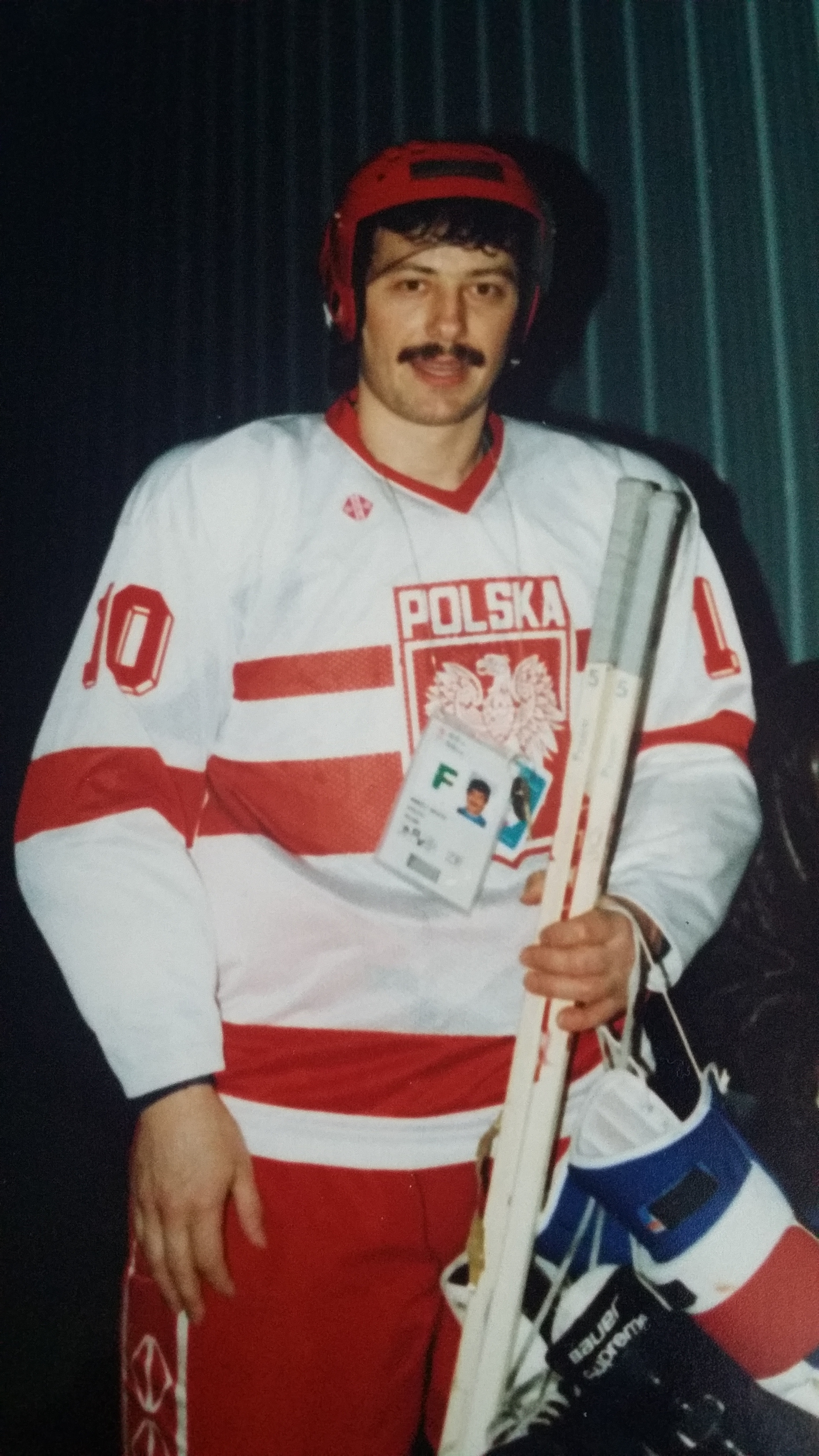 Andrzej Świątek, hokeista